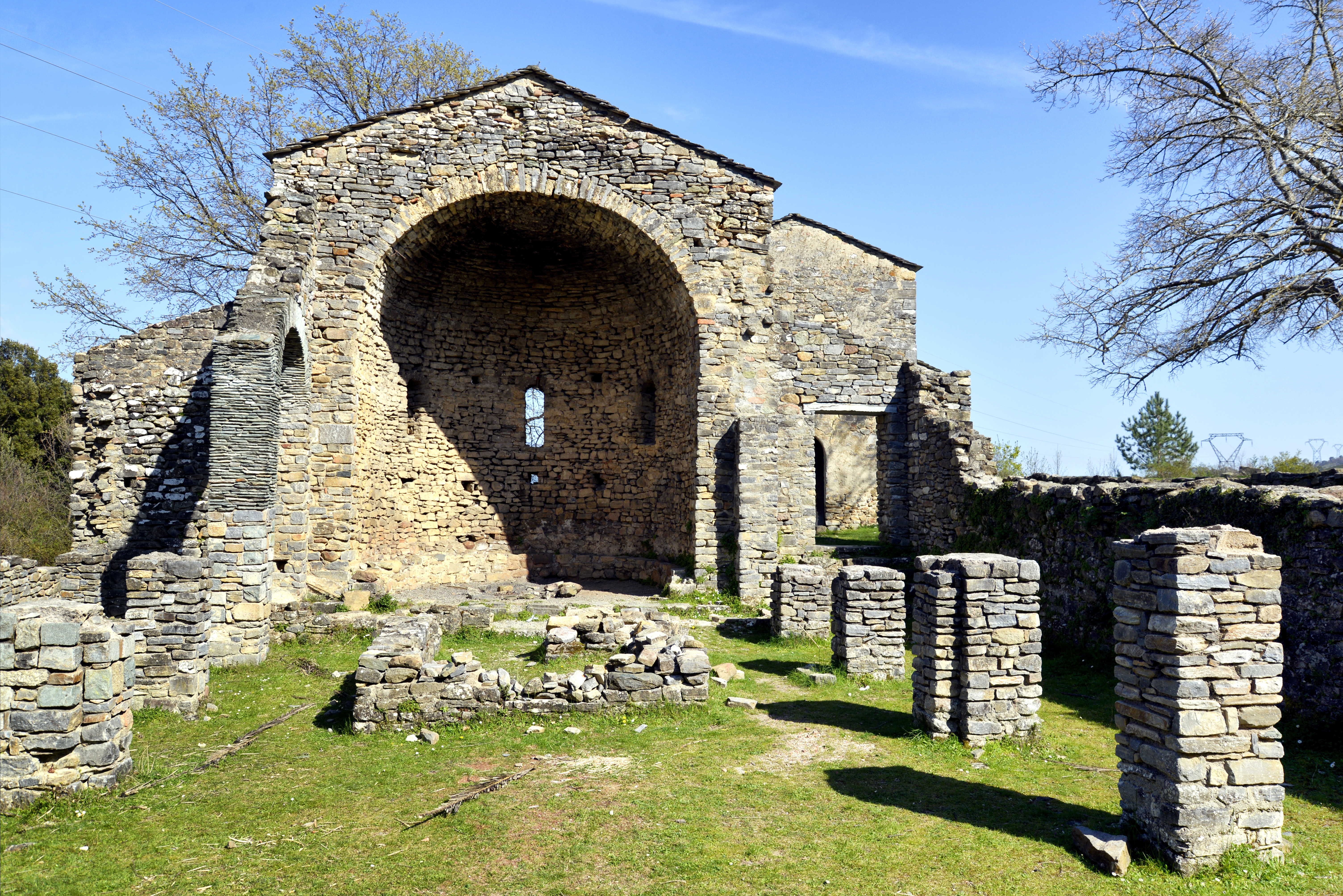 Corte, Centre Corse (France) - Ruines de l'église préromane San Giovanni Battista du IXe siècle. L'ensemble (église et le baptistère voisin) sont classés MH